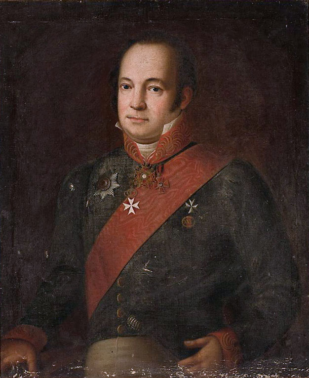 Беларуская (тарашкевіца): Партрэт Лявона Ашторпа (Lavon Aštorp)